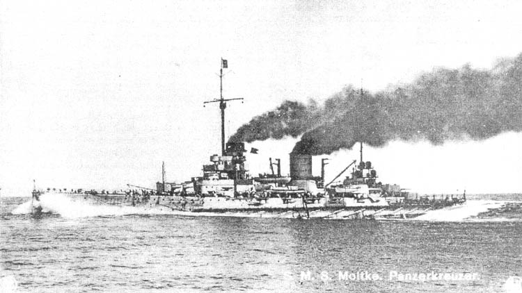 Panzerkreuzer Moltke, 1912-1913, zeitgenössische Postkarte